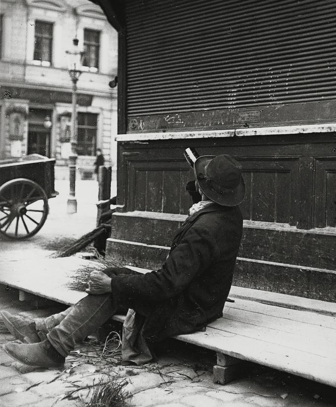 Trinker in Wien